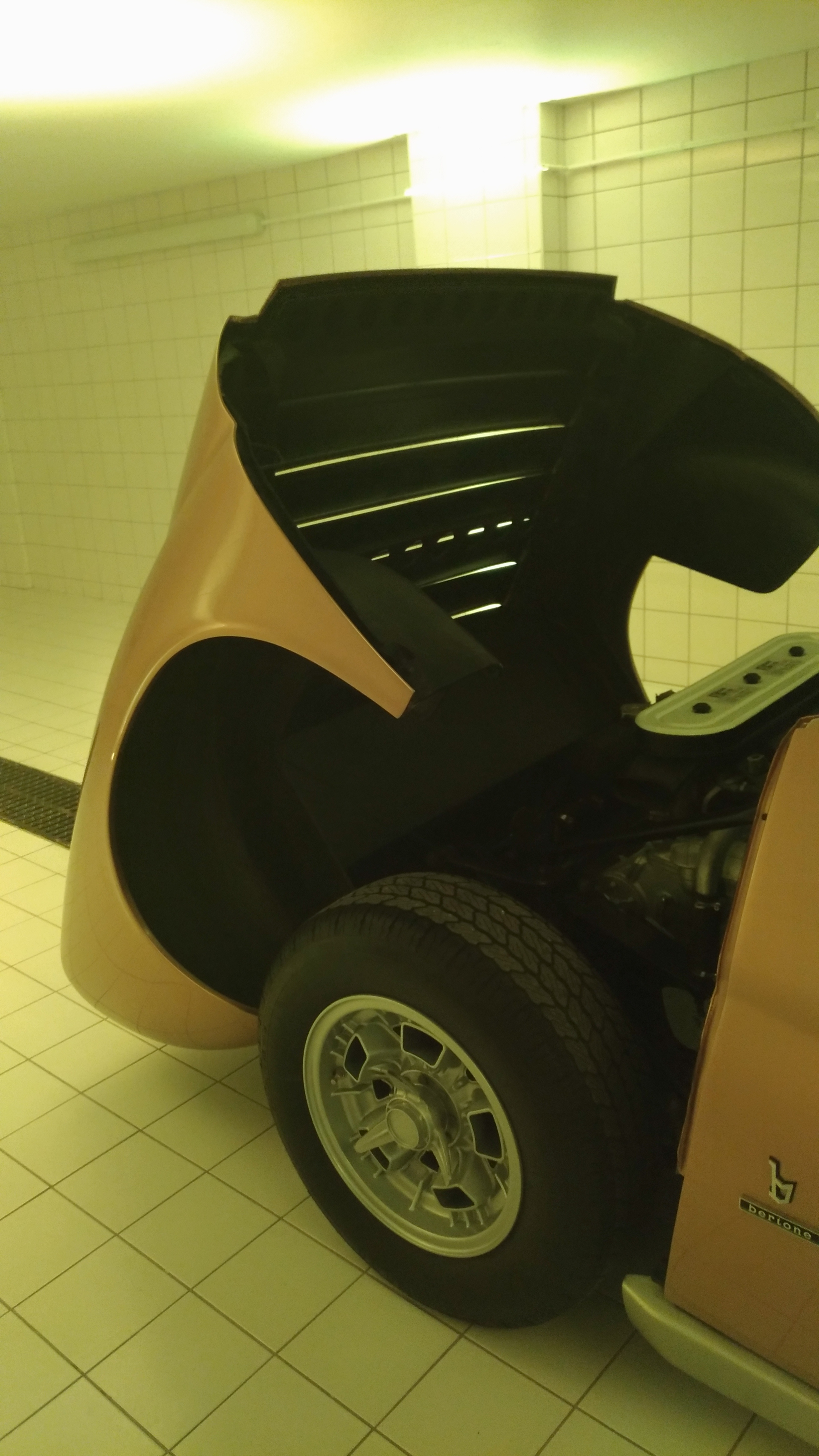 Lamborghini Miura - Soirée inaugurale concession Lamborghini Groupe Schumacher